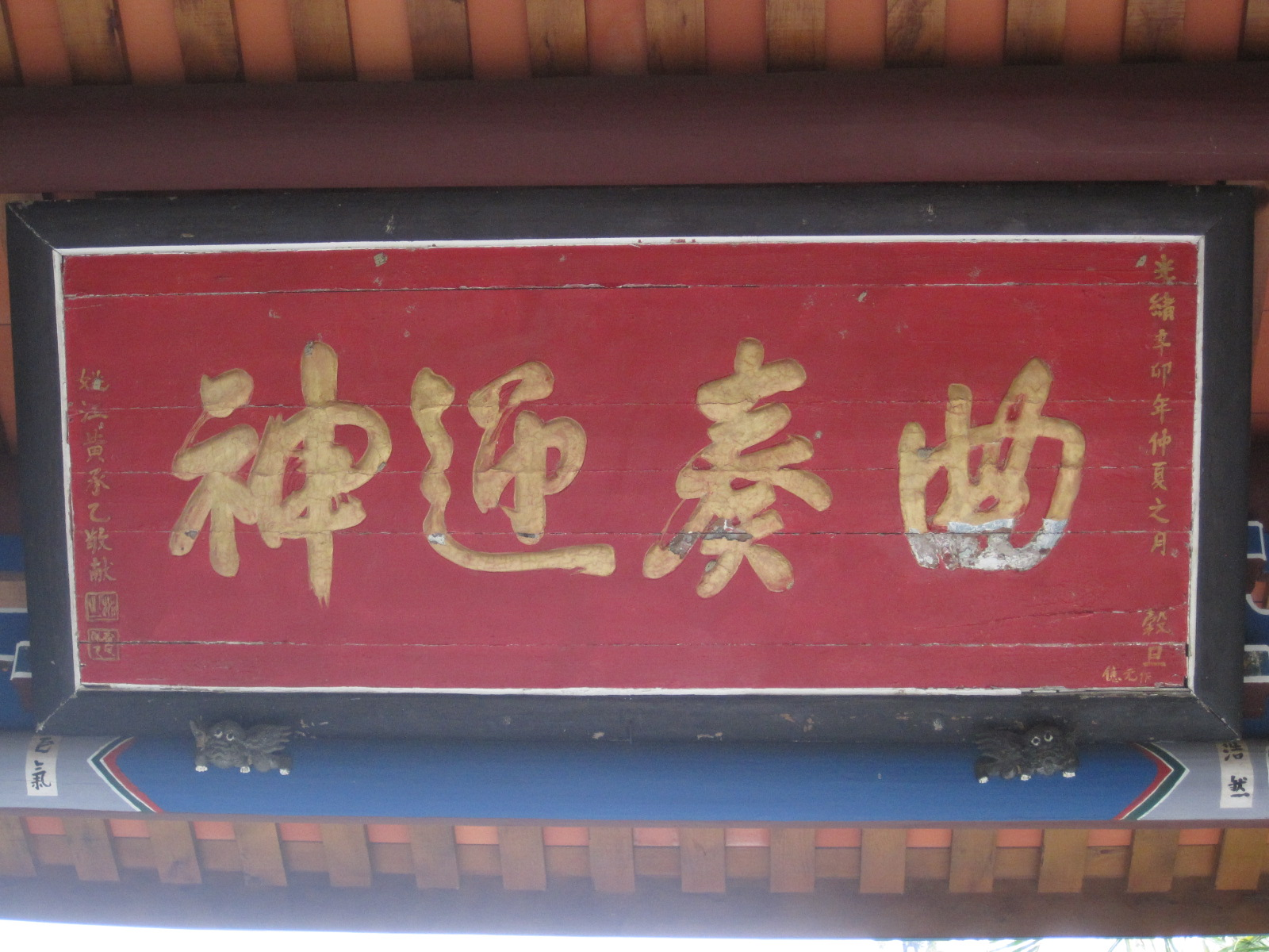 中文（台灣）: 掛於臺中公園望月亭的曲奏迎神匾